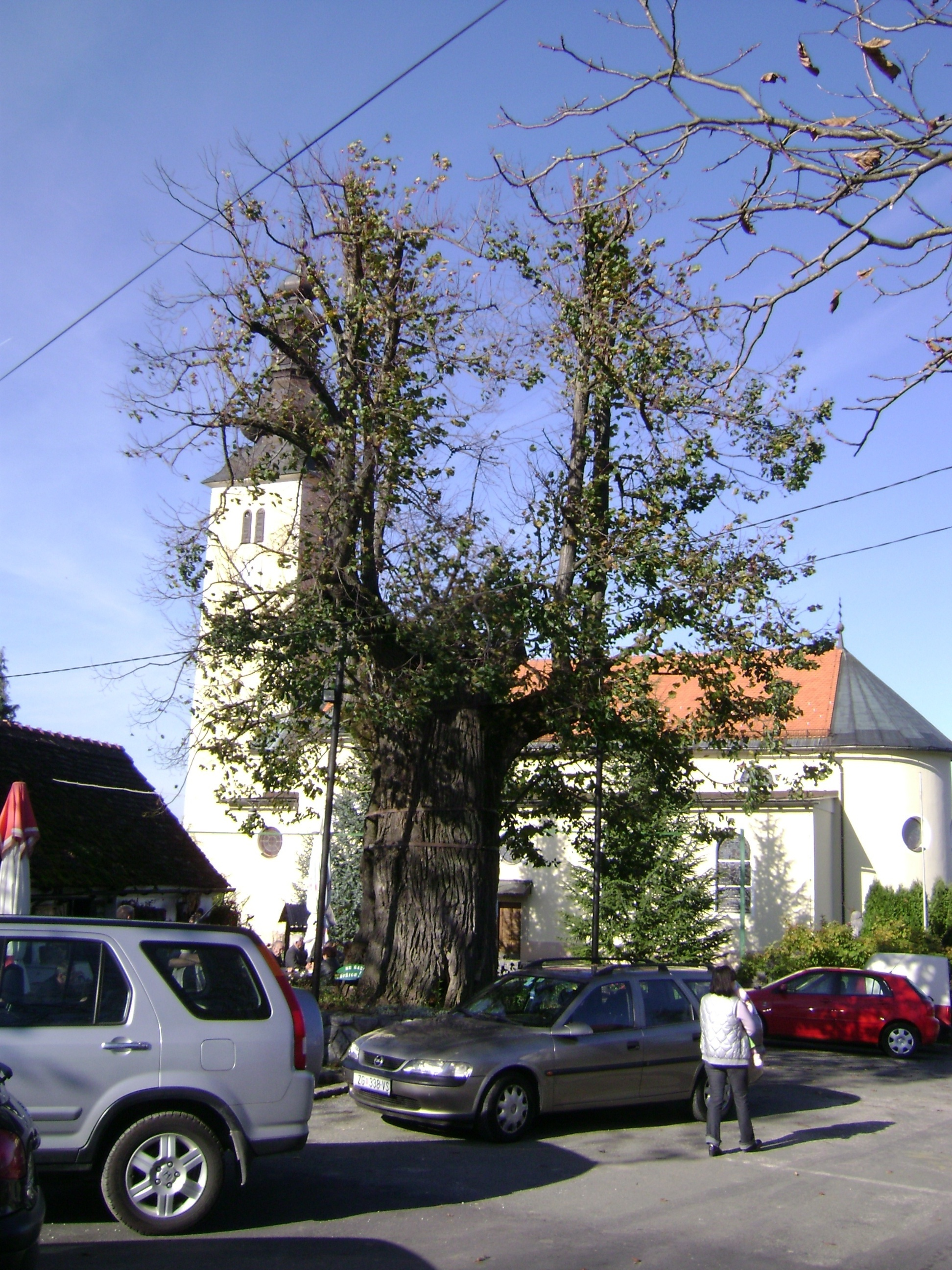 Gupčeva lipa, iz Gornje stubice u jesen.